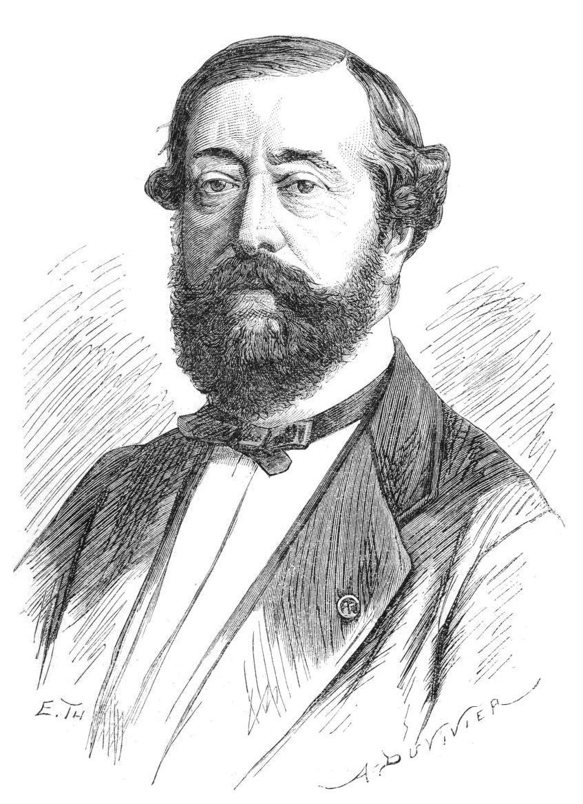 "M. le docteur Delpech, conseiller municipal de la Seine, décédé à Bobourg (Seine-et-Marne), le 5 septembre".